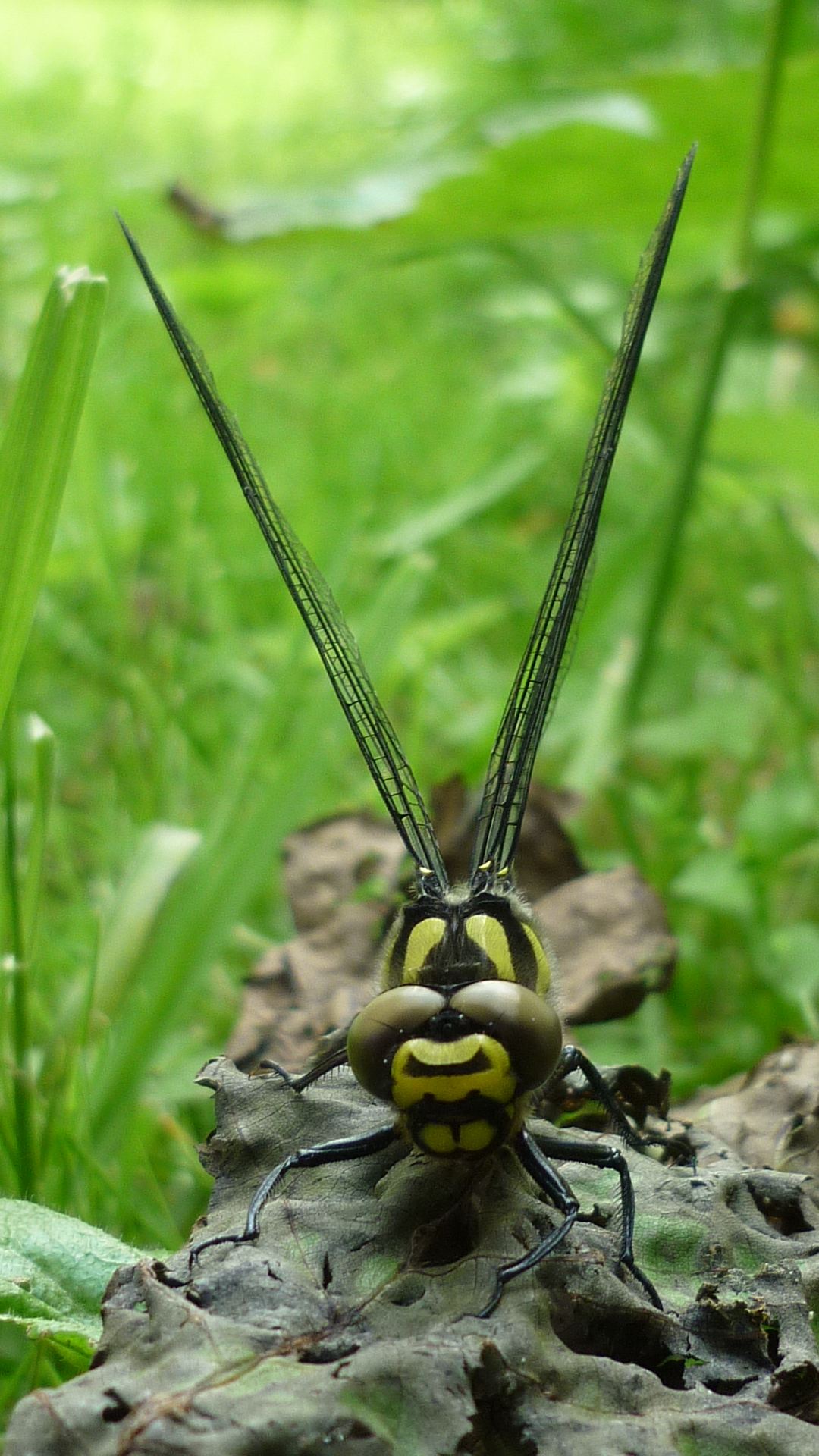 Libellule, Cordulegastre Bidenté, Cordulegaster bidentata, vue de face, yeux en gros plan